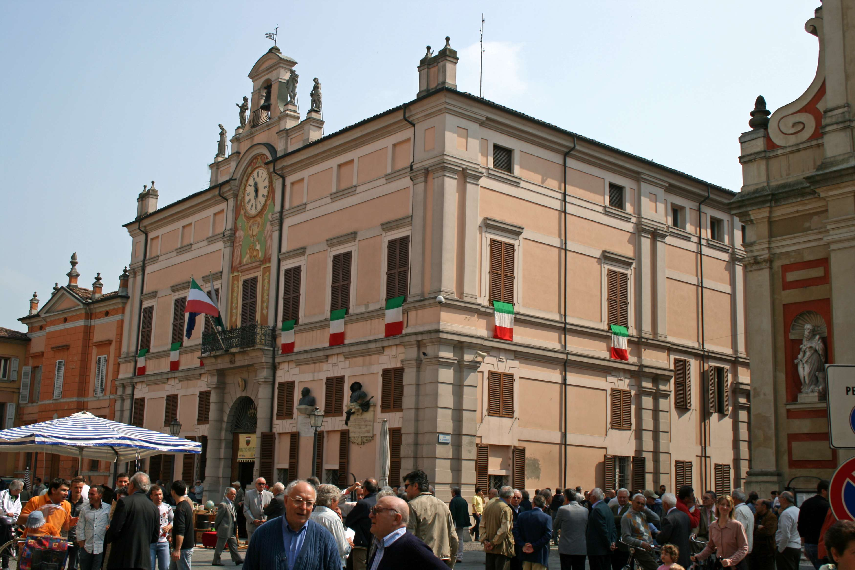 Piazza - Mercato Antiquario